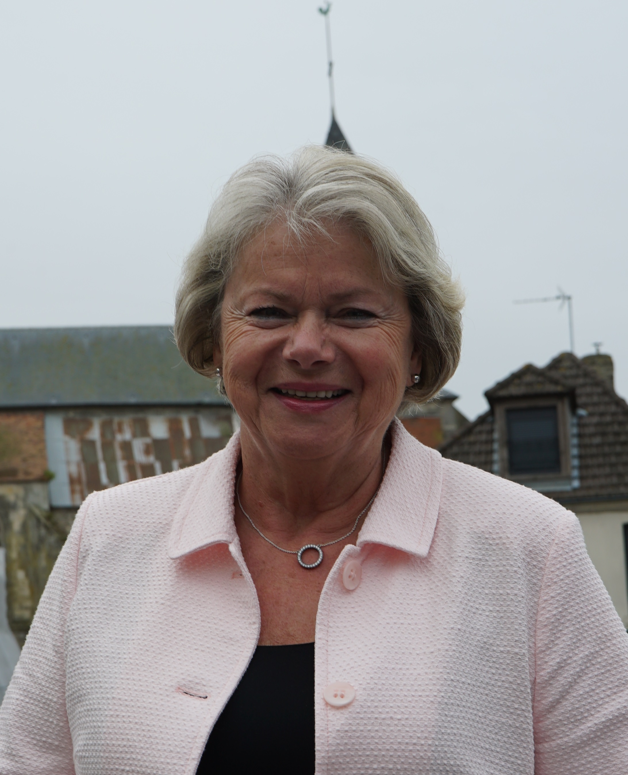 à Châtillon-sur-Marne.